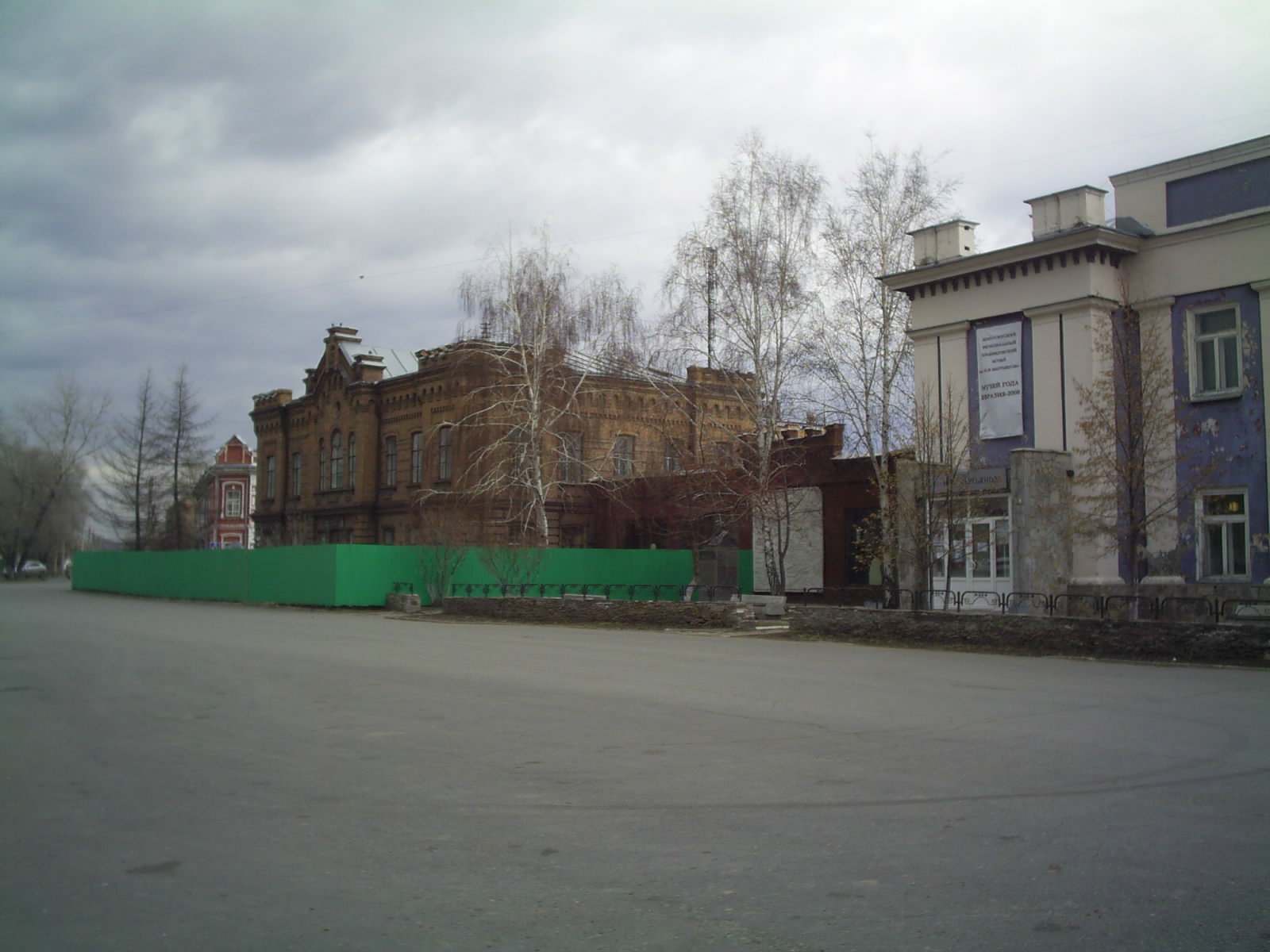 Минусинский краеведческий музей